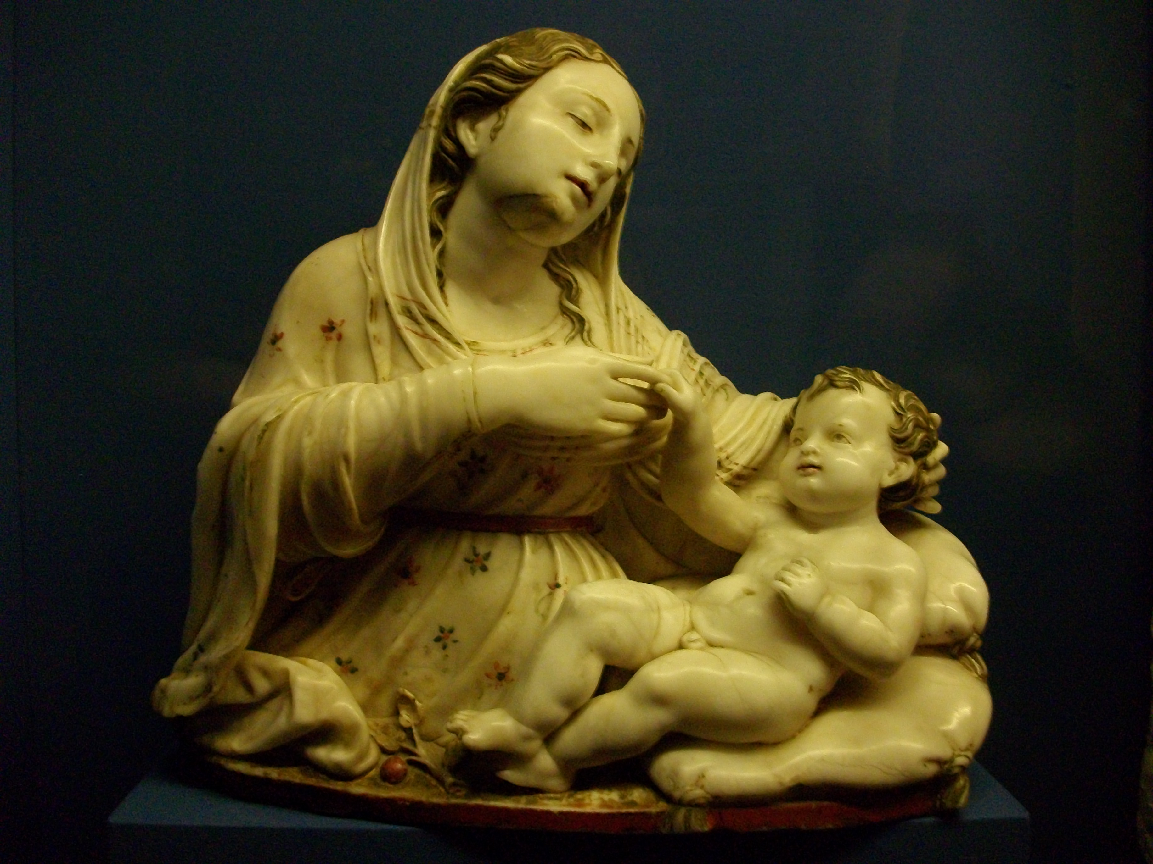 Nuestra Señora del Coro, hacia 1515. Alabastro policromado y dorado, 36 x 40 x 14 cm. Procede del Convento de Carmelitas Descalzas de Santa Teresa, conocido como «Las Fecetas», de Zaragoza (Aragón, España). Colección particular.